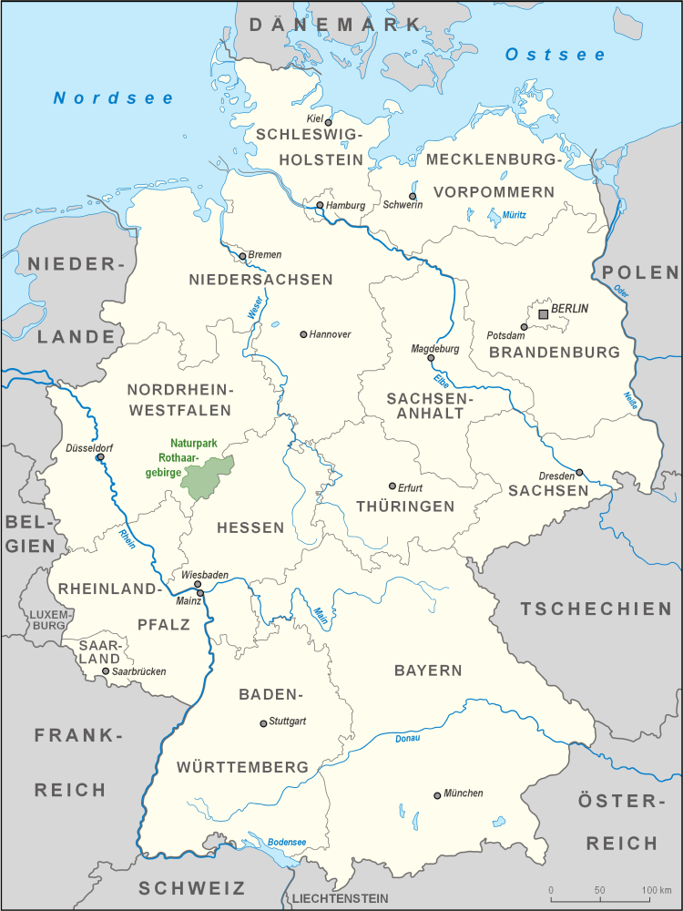 Karte des Naturparks Rothaargebirge in Deutschland